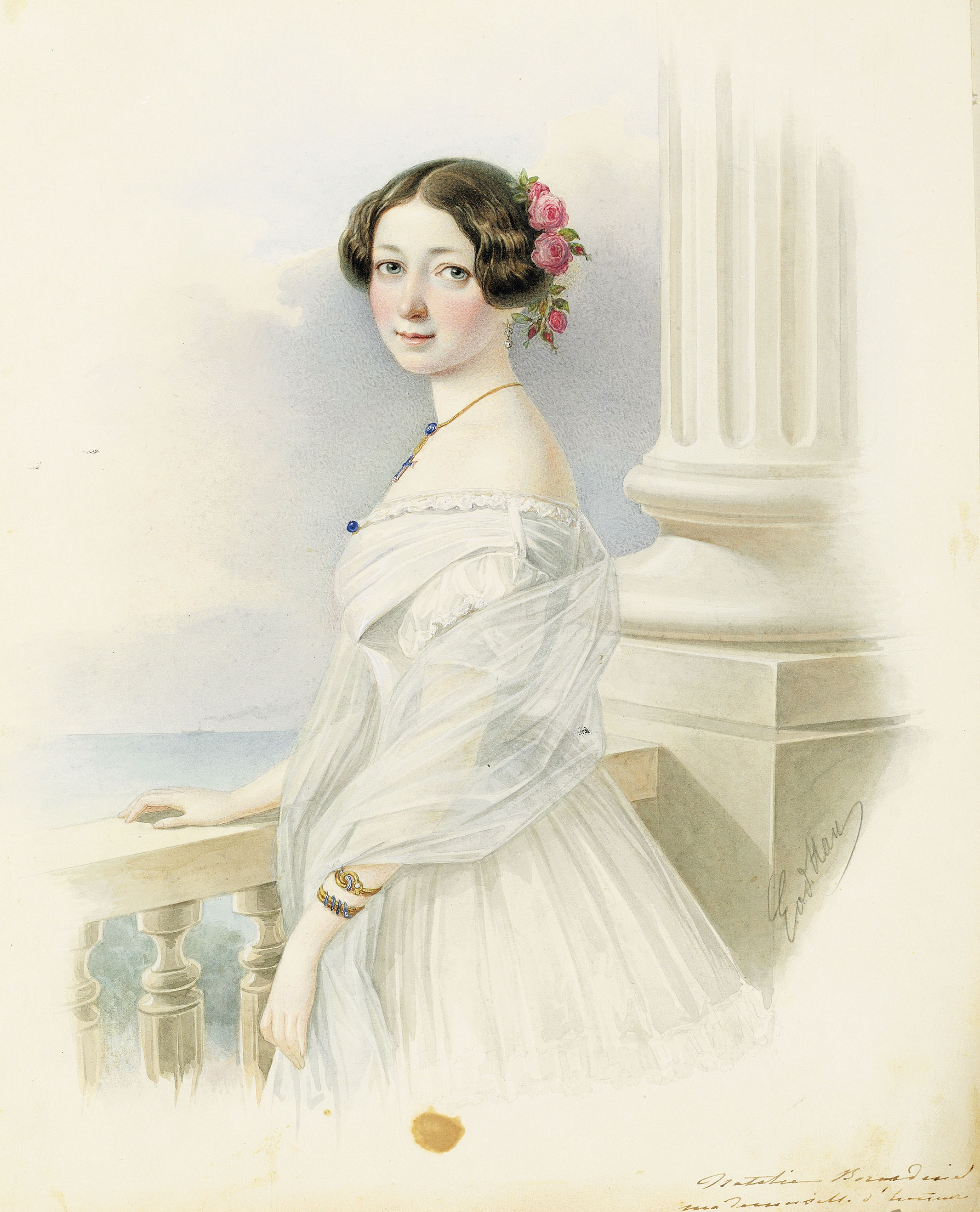 Наталья Николаевна Бороздина (1816—1853), фрейлина, с 1850 года замужем за чиновником Министерства финансов Гавриилом Петровичем Каменским (1824—1898). Жила с мужем в Англии, где скончалась от чахотки.